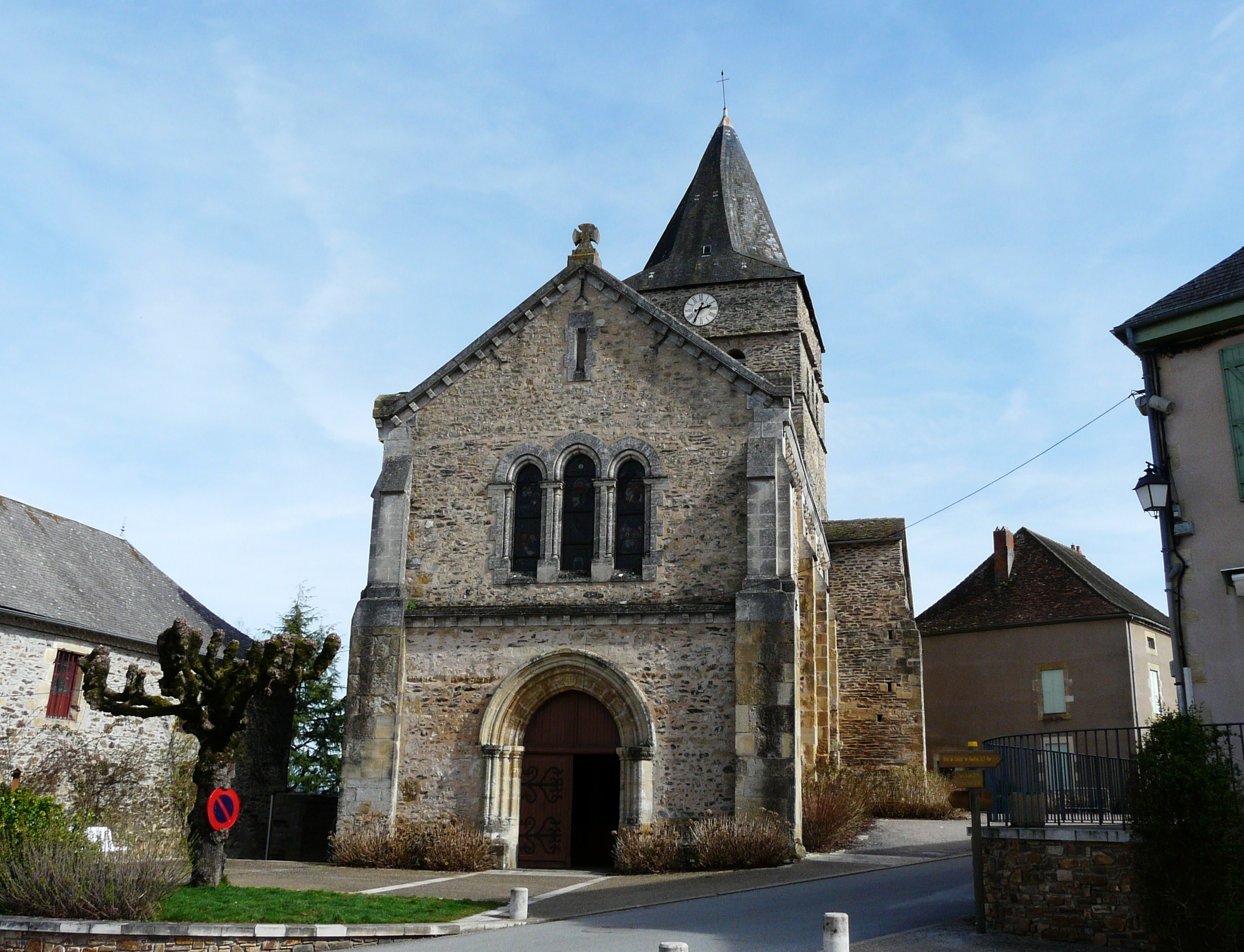 L'église de la Transfiguration, Payzac, Dordogne, France